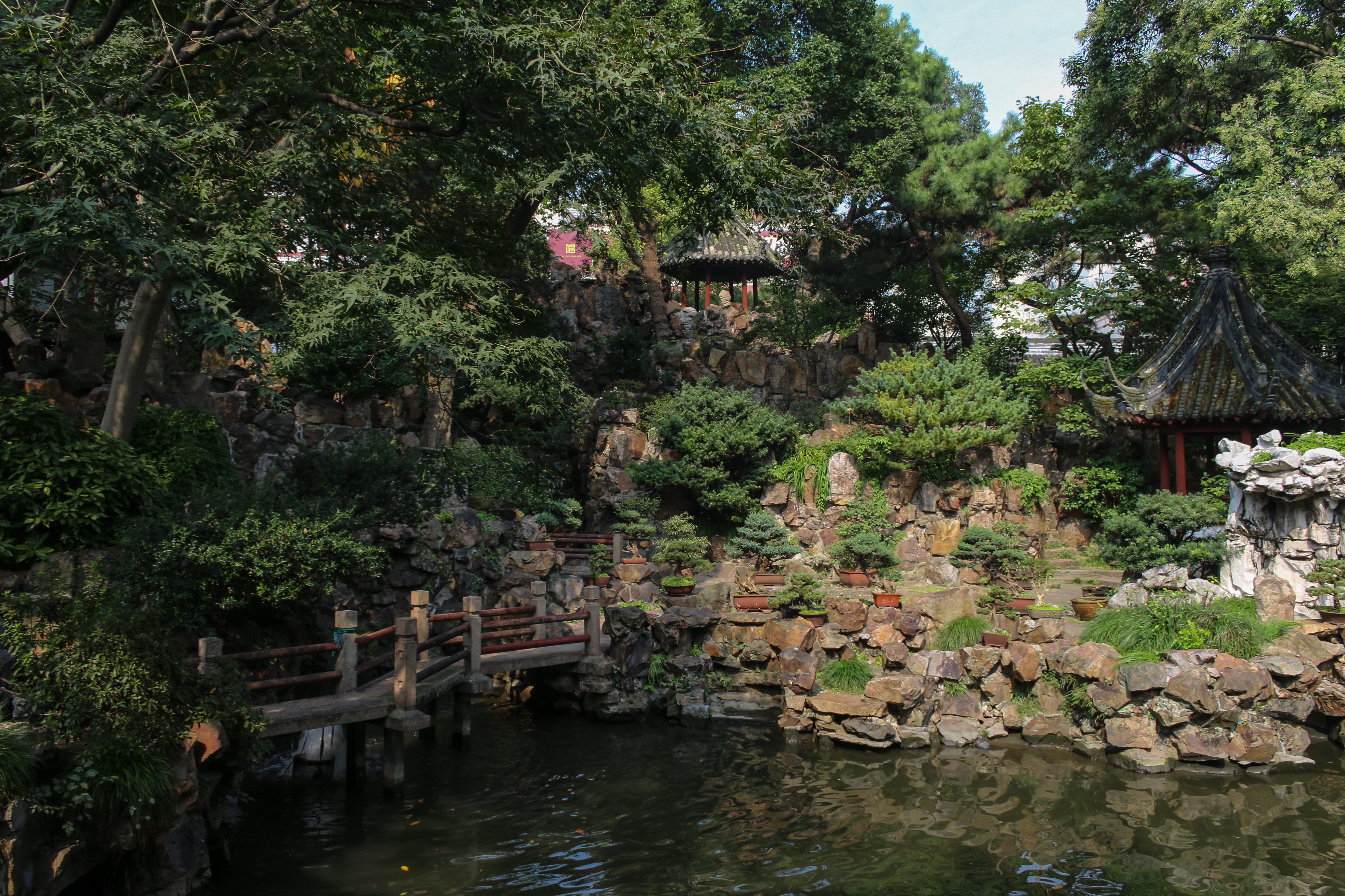 Gartenanlage Yu Yuan (Shanghai)